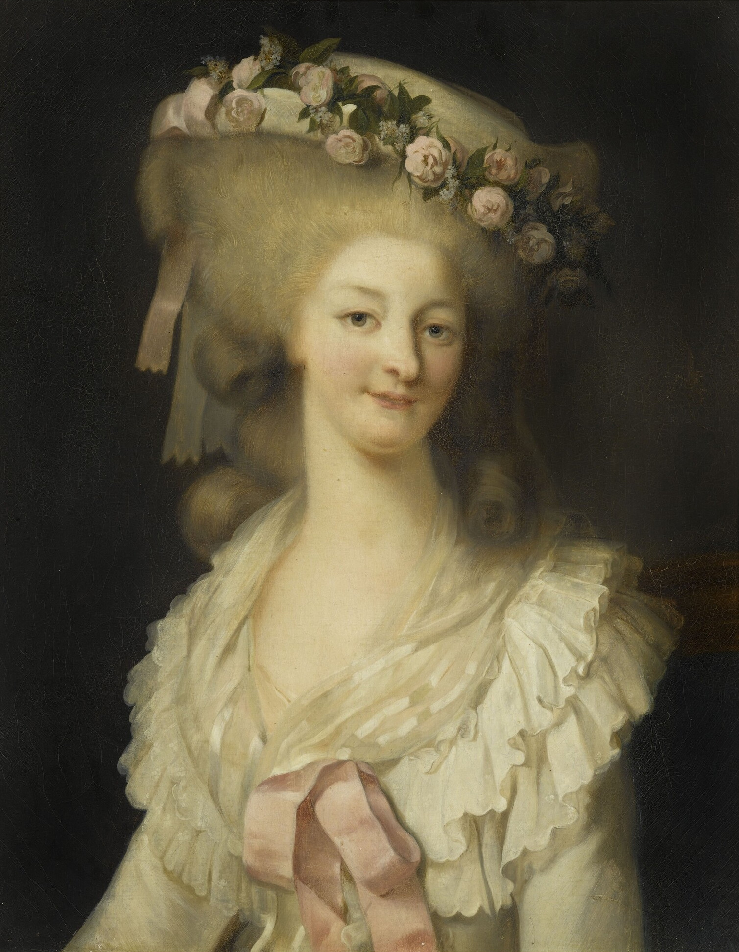 Maria Teresa Luisa di Savoia, principessa di Lamballe, amica intima della regina Maria Antonietta.